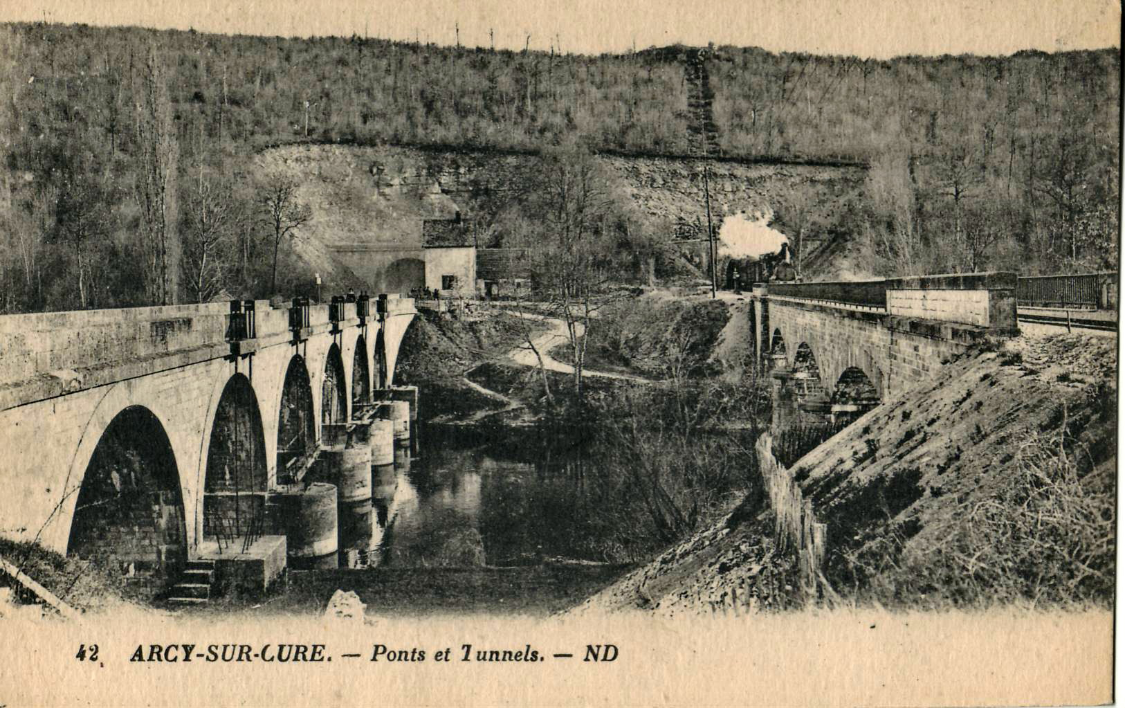 Carte postale ancienne éditée par ND, n°42. Titre : "ARCY-SUR-CURE - Ponts et tunnels. N.D.". Vue vers le sud. Côté nord du massif de la côte de Char, deux ponts desservent les sorties de deux tunnels traversant le massif entre Saint-Moré (village de l'autre côté des ponts devant nous) et Arcy-sur-Cure (derrière nous). Pont routier (route D606) à gauche, la Cure au milieu, pont ferroviaire à droite : la photo montre le nuage de vapeur d'un train sortant du tunnel. Le train sur cette photo est encore sur Saint-Moré, et les entrées des tunnels sont sur le territoire de Saint-Moré : la limite de communes entre Arcy et Saint-Moré suit exactement le tracé du chemin que l'on voit entre les deux ponts, et qui fait le tour du massif par le côté droit de la photo (côté ouest). La Cure coule ici de droite à gauche. Sur la droite, elle vient de faire un long détour de 2,8 km qu'elle a débuté à l'autre extrémité des tunnels, pour contourner le massif. Les grottes de Saint-Moré sont dans ce massif, sur la face sud des falaises à l'autre extrémité des tunnels. Les grottes d'Arcy, très renommées, sont sur la même rive que le photographe, sur la droite.